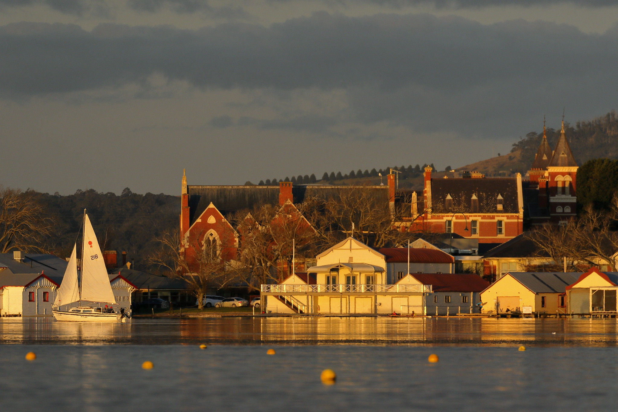 Lake Wendouree. Ballarat.